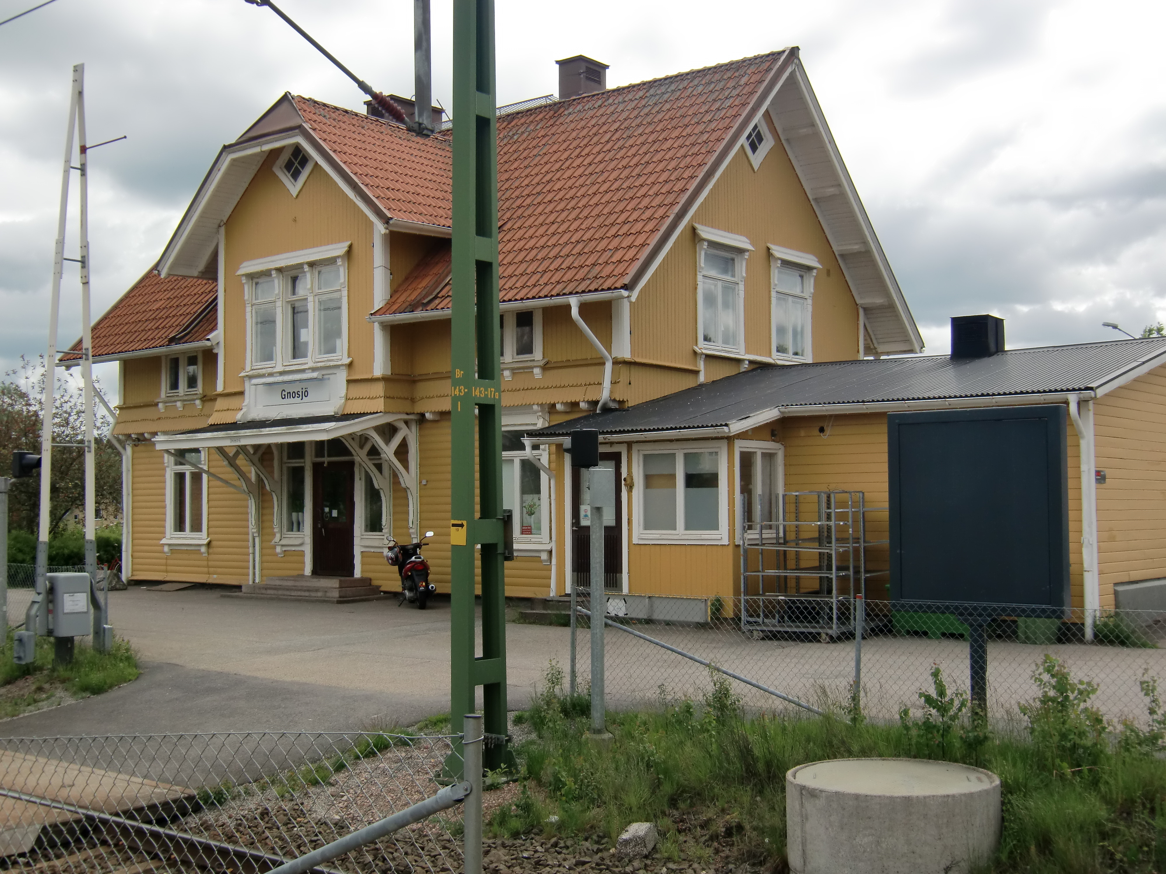 Gnossjö Bahnhof